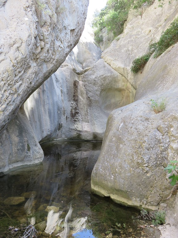 Gorges du Destel, Var, France